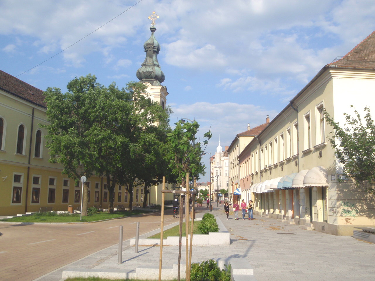 Szombathely - Innenstadt